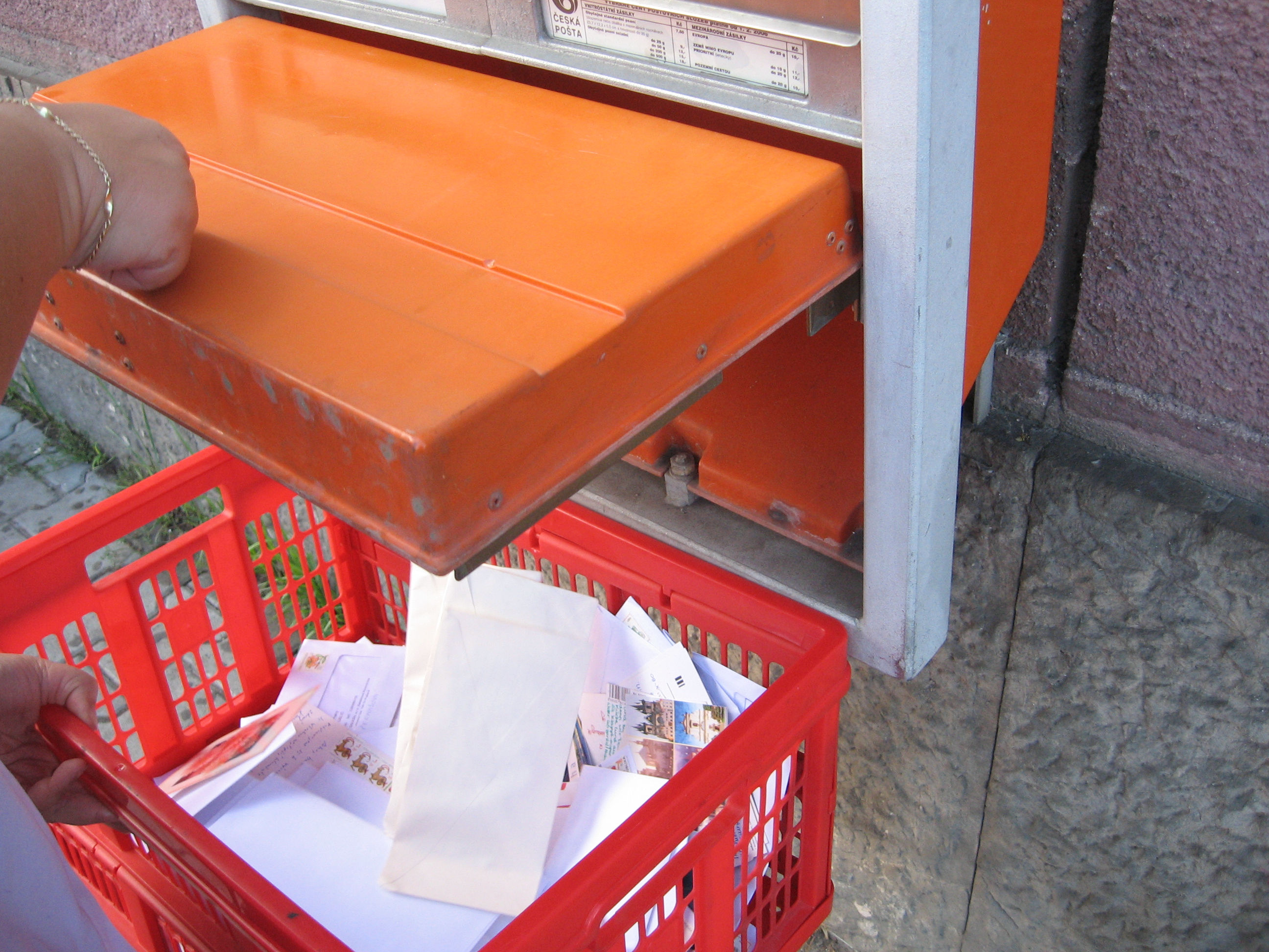 Mailbox in the Czech Republic, vybírání poštovní schránky pracovníkem pošty v Praze, kličem se odemkne přední kryt, zvedne se nahoru, dopisy spadnou do připravené nádoby či pytle